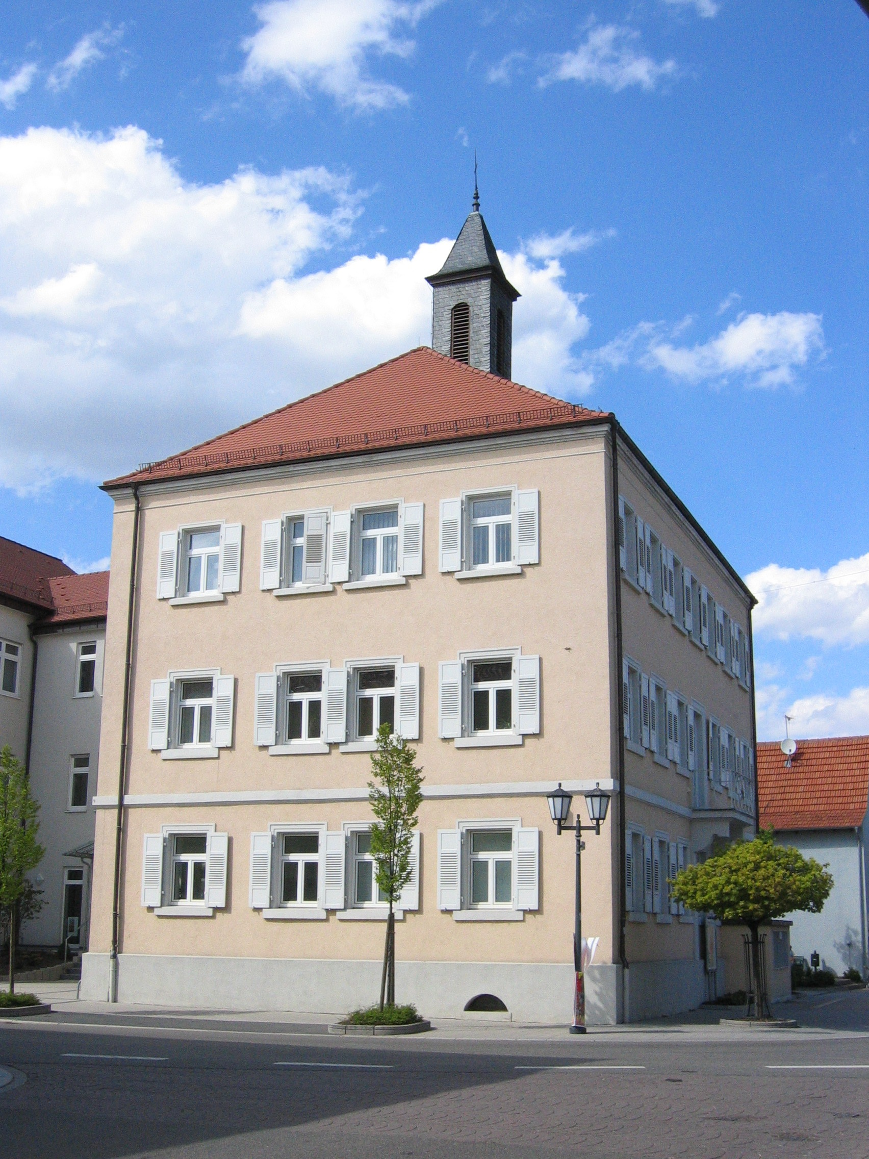 Rathaus Kronau Deutschland